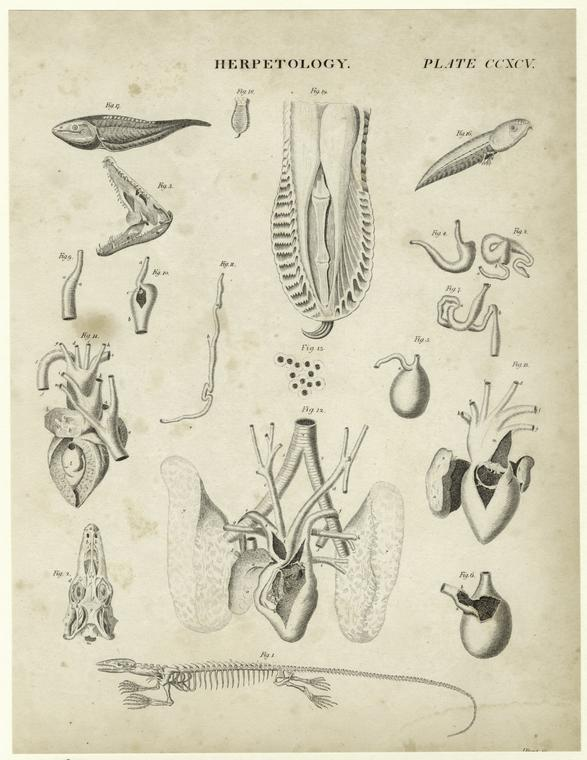 Herpetology